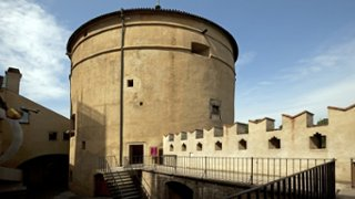 mihulka